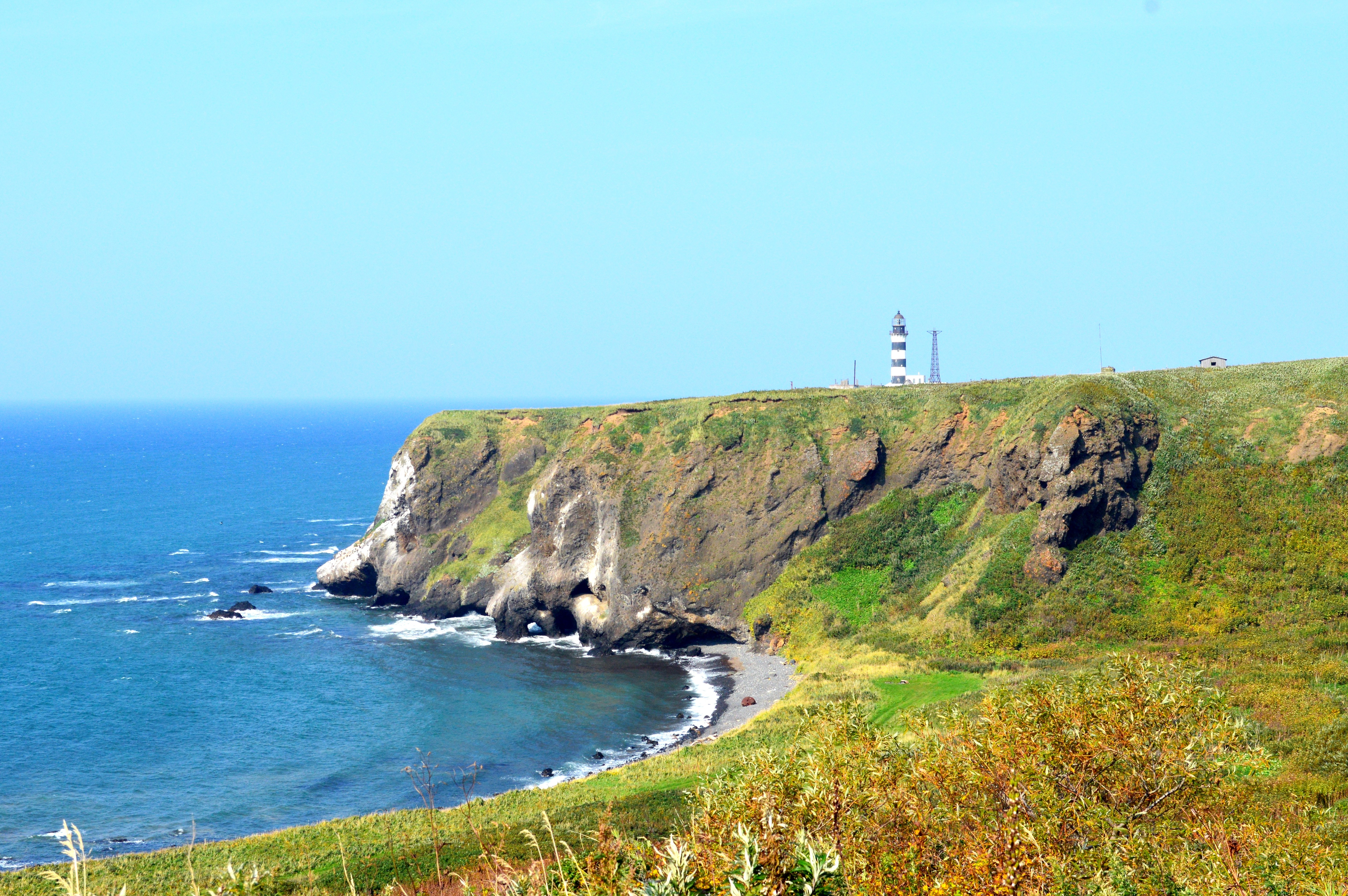 Мыс Ламанон на острове Сахалин